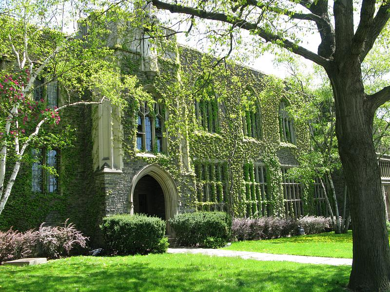 Emmanuel College